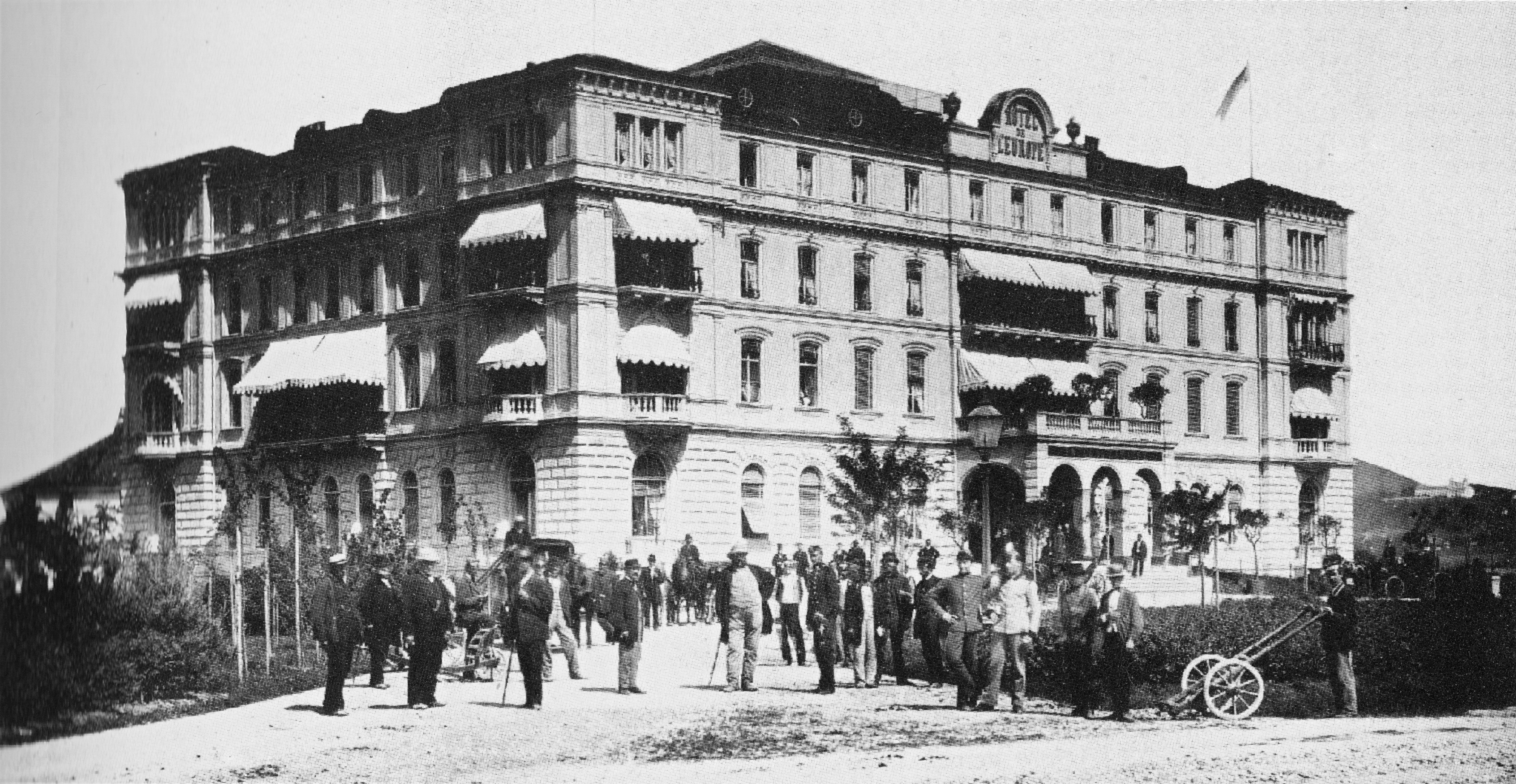 Hotel de l'Europe, auch Grand Hotel de l'Europe, Hotel Europäischer Hof, in Salzburg 1865; Fotograf unbekannt